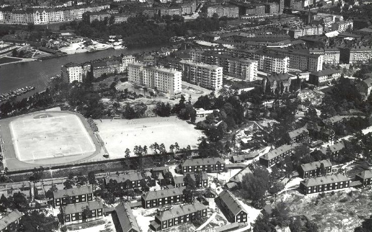 Flygfoto över gamla och nya Stadshagen 1939